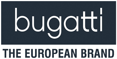 Unternehmenslogo der bugatti Holding Brinkmann GmbH & Co. KG